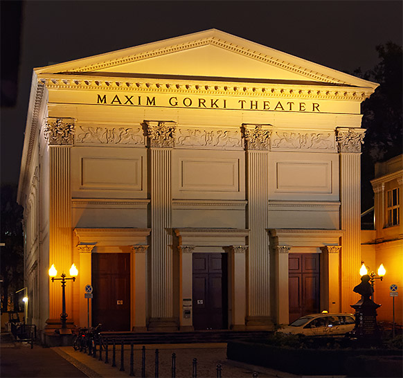 Maxim Gorki Theater im Haus der Berliner Singakademie in der Dorotheenstadt in Berlin-Mitte hinter der neuen Wache. This is a photograph of an architectural monument. (OB084771-Vvq)